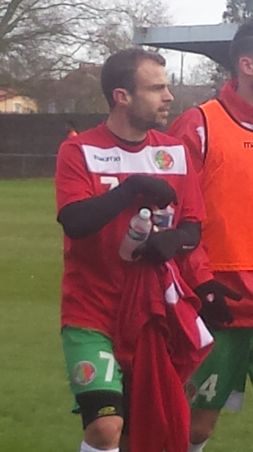 Benoît Leroy avant le match Lens B - Sedan, au Stade François-Blin d'Avion, match comptant pour le championnat de France de CFA (quatrième division française), le 24 janvier 2015